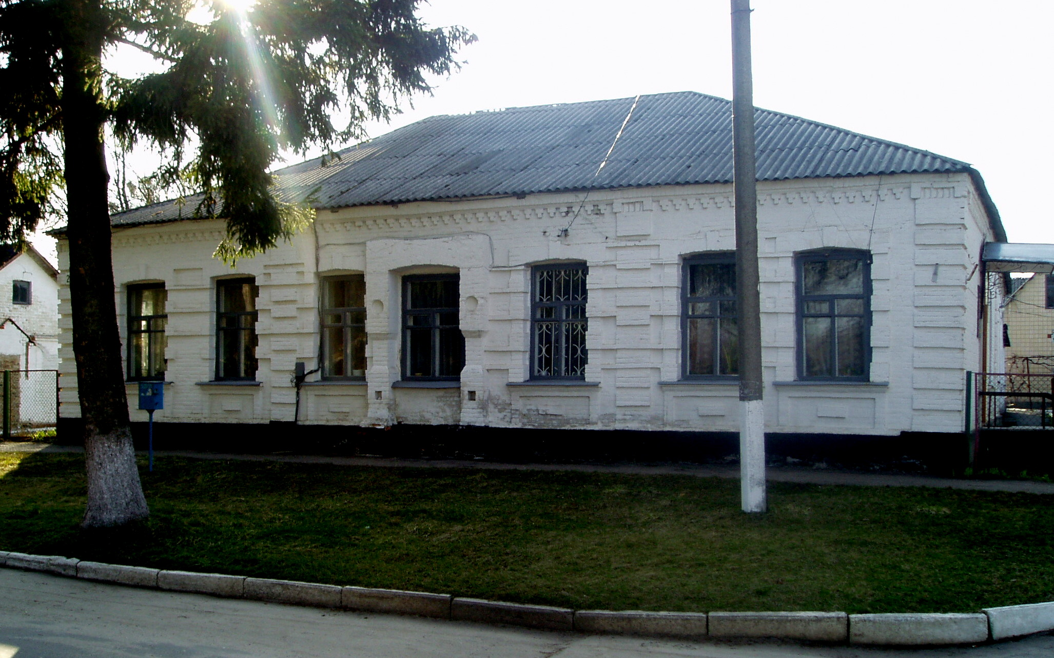 Тараща ймовірно приміщення синагоги: За виключенням добудоваї в радянський період задньої частини будинку